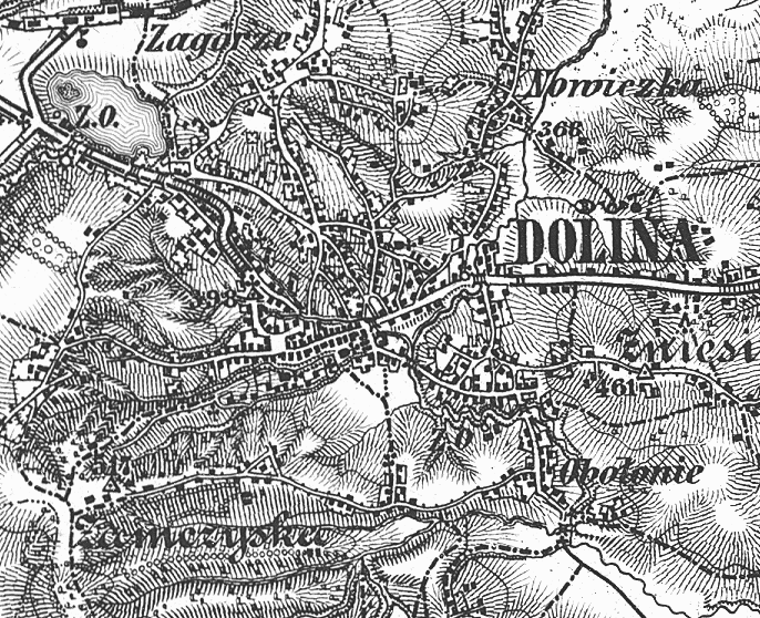 miasto Dolina woj. Stanisławowskie, austriacka mapa wojskowa 1877, prowincja Galicja